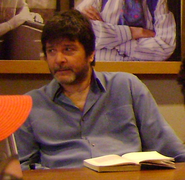 Marcelo Rubens Paiva, escritor brasileiro, durante a Balada Literária, na Livraria da Vila, em São Paulo.